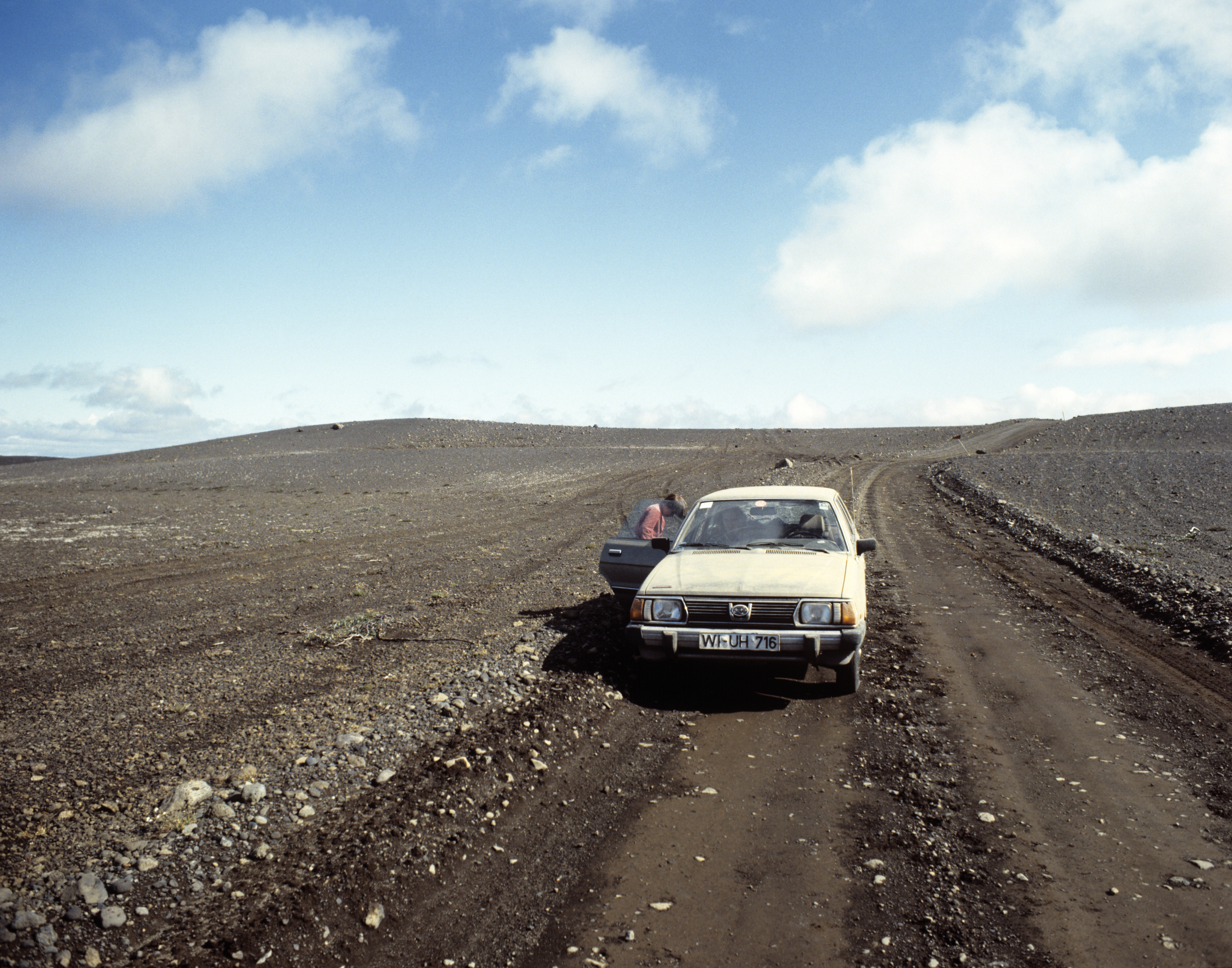 Weg von Süden nach Hveravellir, Island.